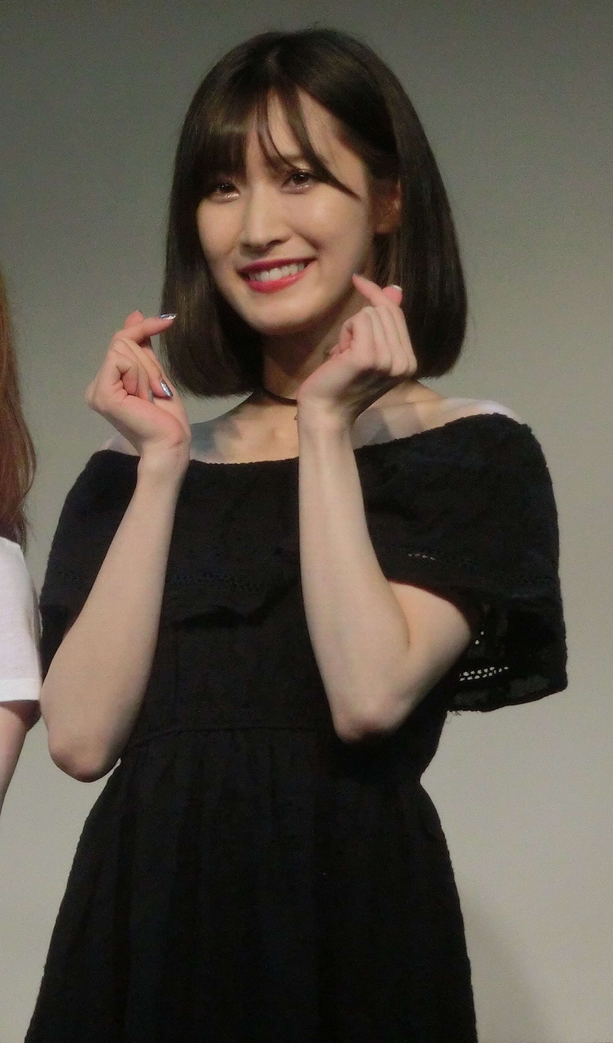 2019年7月23日、渋谷LOFT9「三上悠亜とK-POPを聴く夜・第二夜」